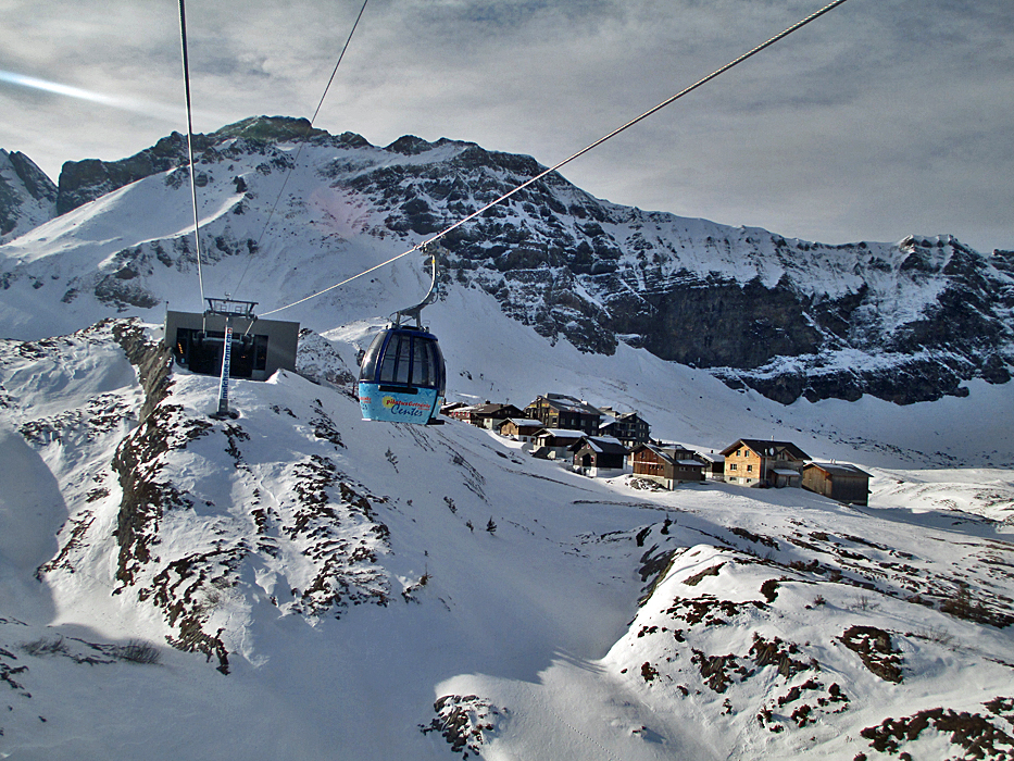 Gondelbahn nach Melchsee Frutt